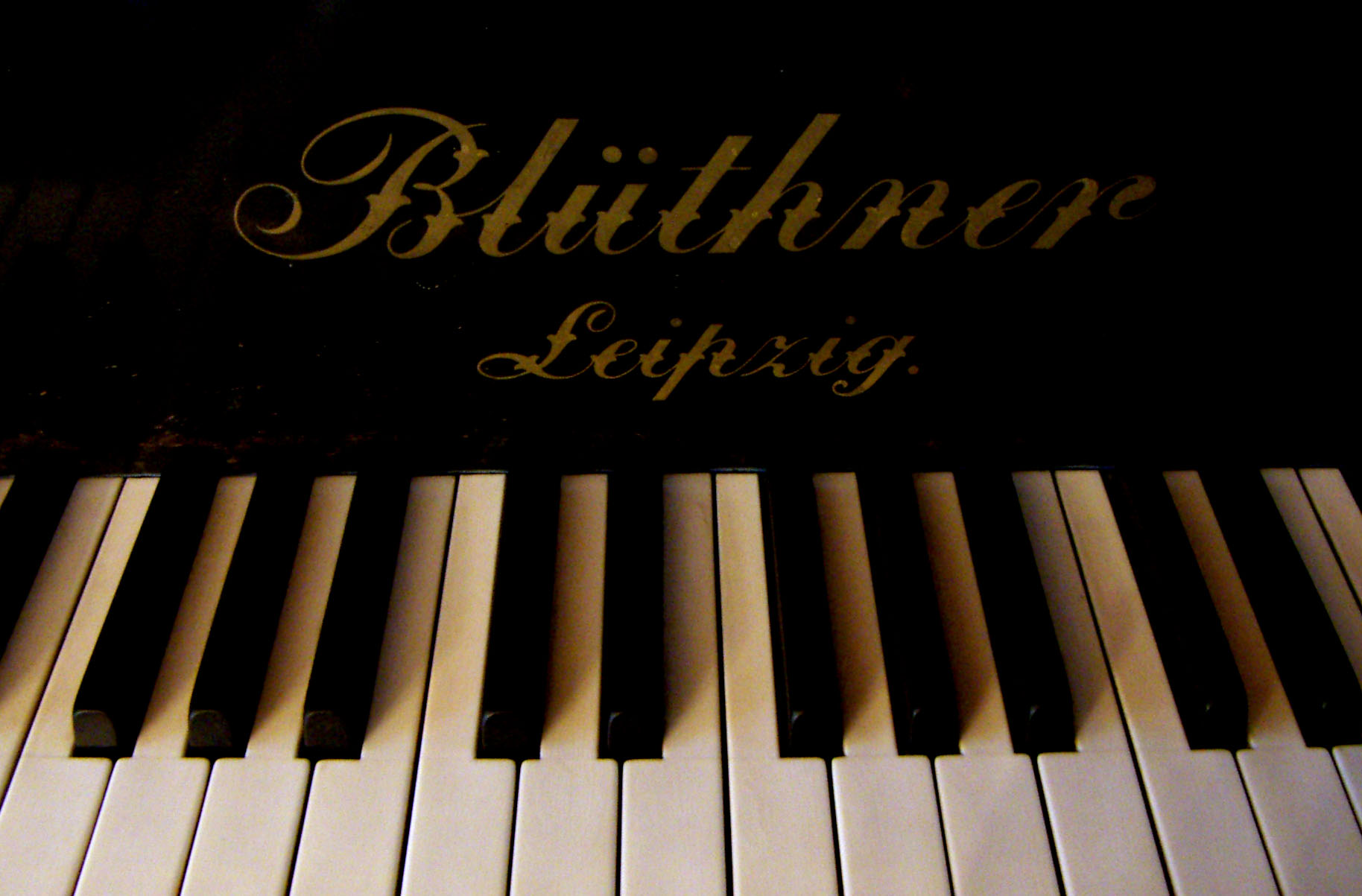 Historischer Blüthner Flügel (Baujahr 1898)